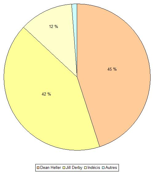 Elections 2006 à la Chambre des représentants des Etats-Unis - 2ème district du Nevada - Sondage du 26 septembre 2006